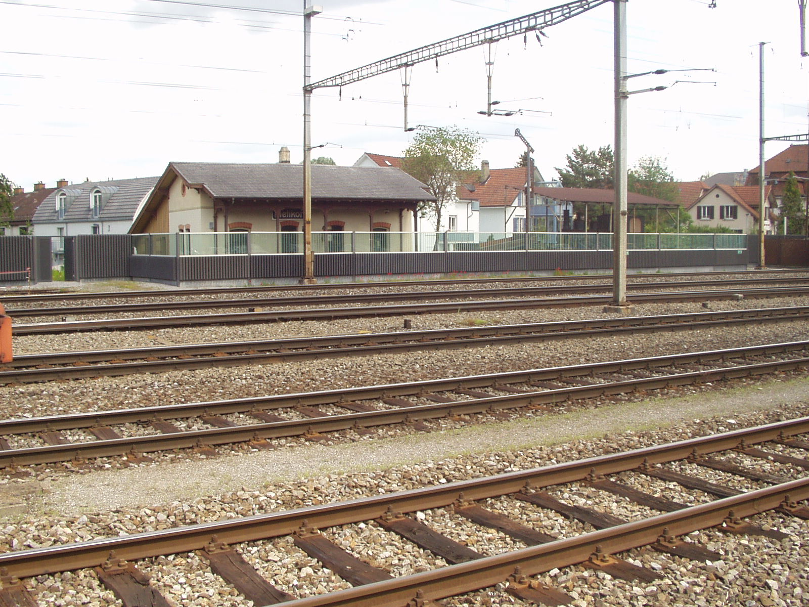 Das ehemalige Bahnhofgebäude von Dietikon aus dem Jahre 1847, es ist das älteste erhaltene Bahnhofsgebäude der Schweiz